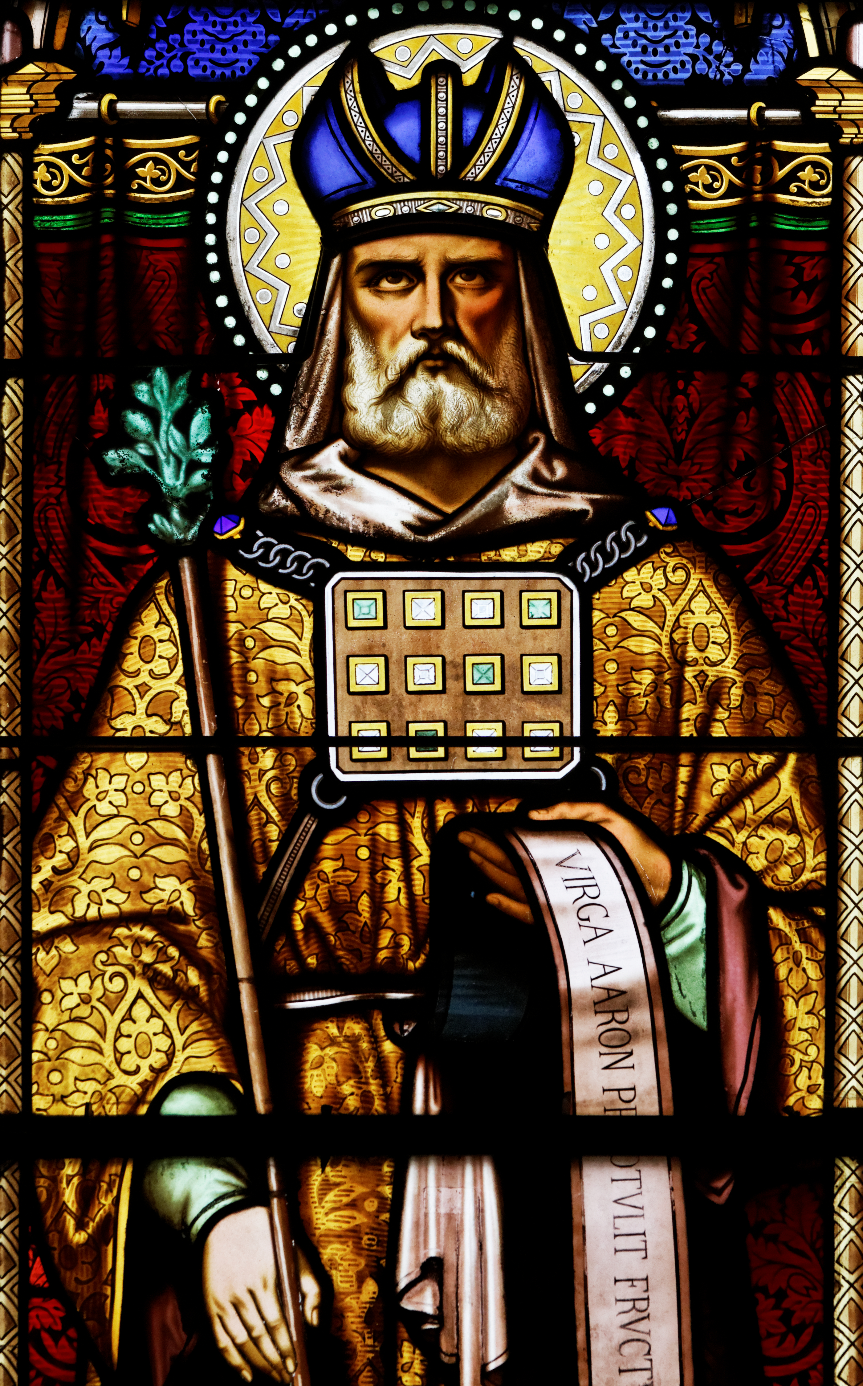 Baie 24 de la cathédrale Saint-Corentin à Quimper dans le Finistère. 1ère lancette. Aaron. Virga Aaron protulit fructum sine plantatione (Le rameau d'Aaron a produit du fruit sans avoir été planté).